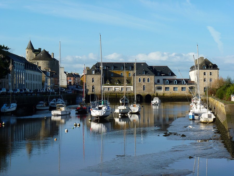 Port de Pont l'abbé